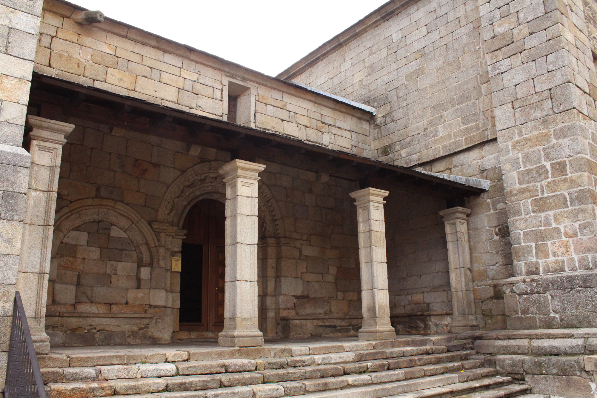 Church of Santa María del Azogue, in Puebla de Sanabria